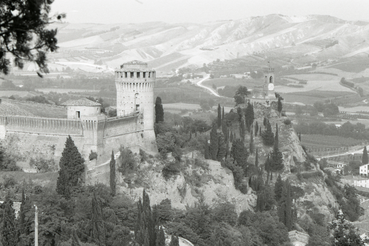 Servizio fotografico : Brisighella, 1974 / Paolo Monti. - Strisce: 5, Fotogrammi complessivi: 29 : Negativo b/n, gelatina bromuro d'argento/ pellicola ; 35 mm. - ((Sul portanegativi: N[I]K[MA]T FP4. - All'interno del portanegativi: la serie è anche identificata da una linea orizzontale a pennarello blu che separa la suddetta serie dalla precedente di soggetto diverso. - Occasione: Campagna di rilevamento del centro storico. - Fonte: Agenda di Paolo Monti: Leica 1501-3000 Controllo numerazione (1950-1978), presso Archivio Paolo Monti